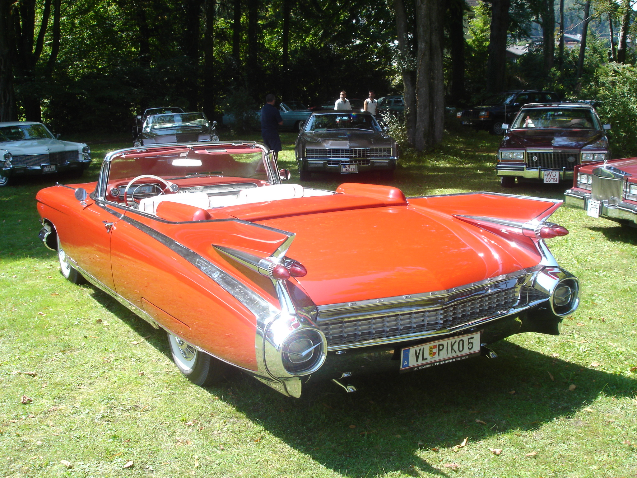 Heck eines Cadillac Eldorado aus 1959